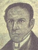 Domingos Borges de Barros, Visconde de Pedra Branca, pai da Condessa de Barral